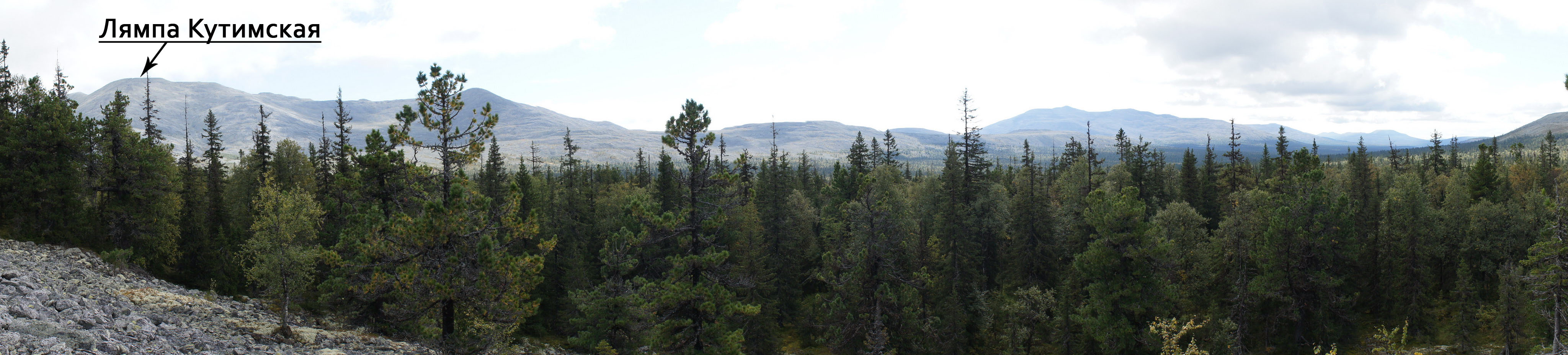 Гора Лямпа Кутимская (Гумбольдта), Урал, Россия